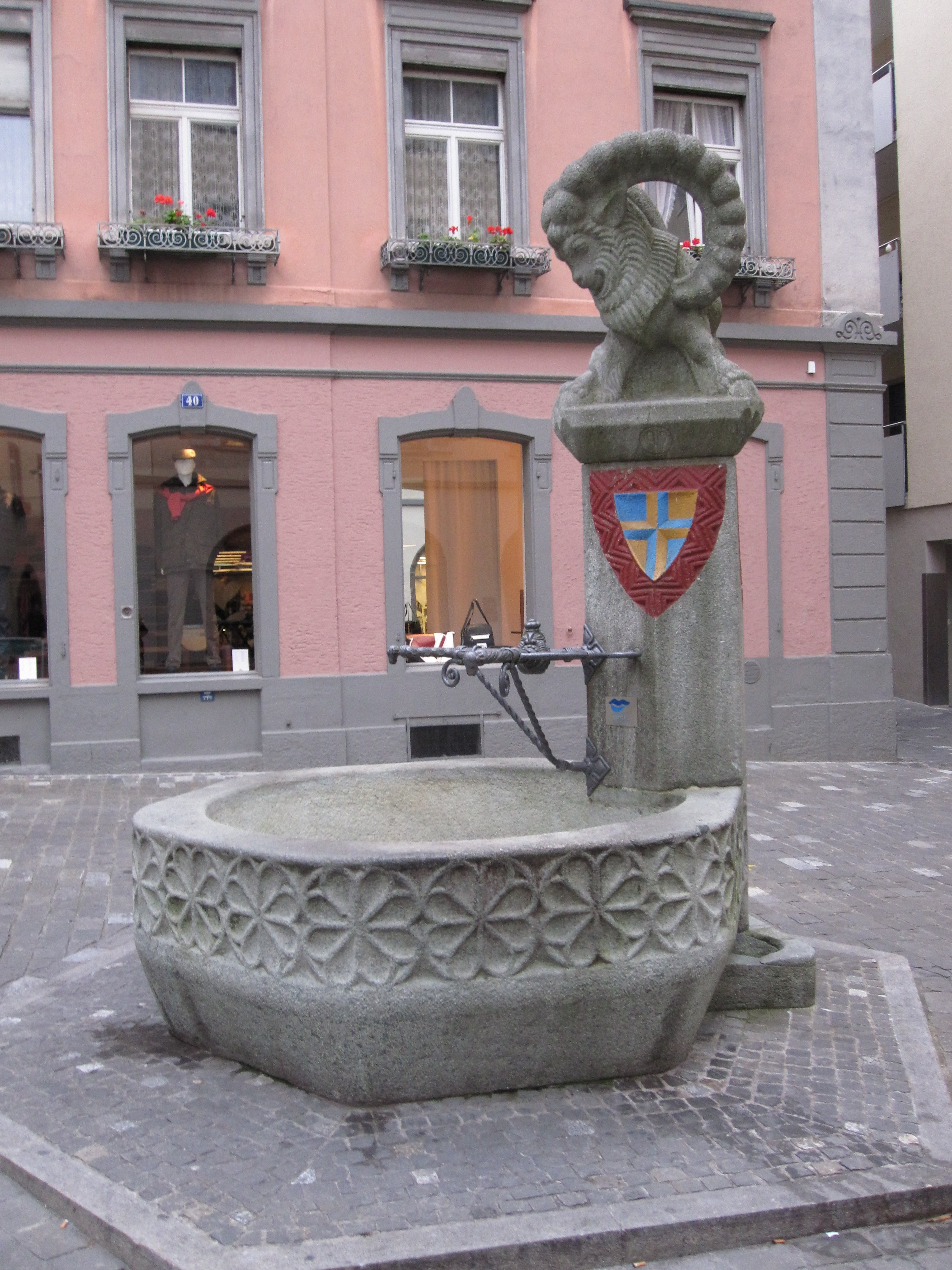 Brunnen auf dem Majoranplatz in Chur (Schweiz, Kanton Graubünden)